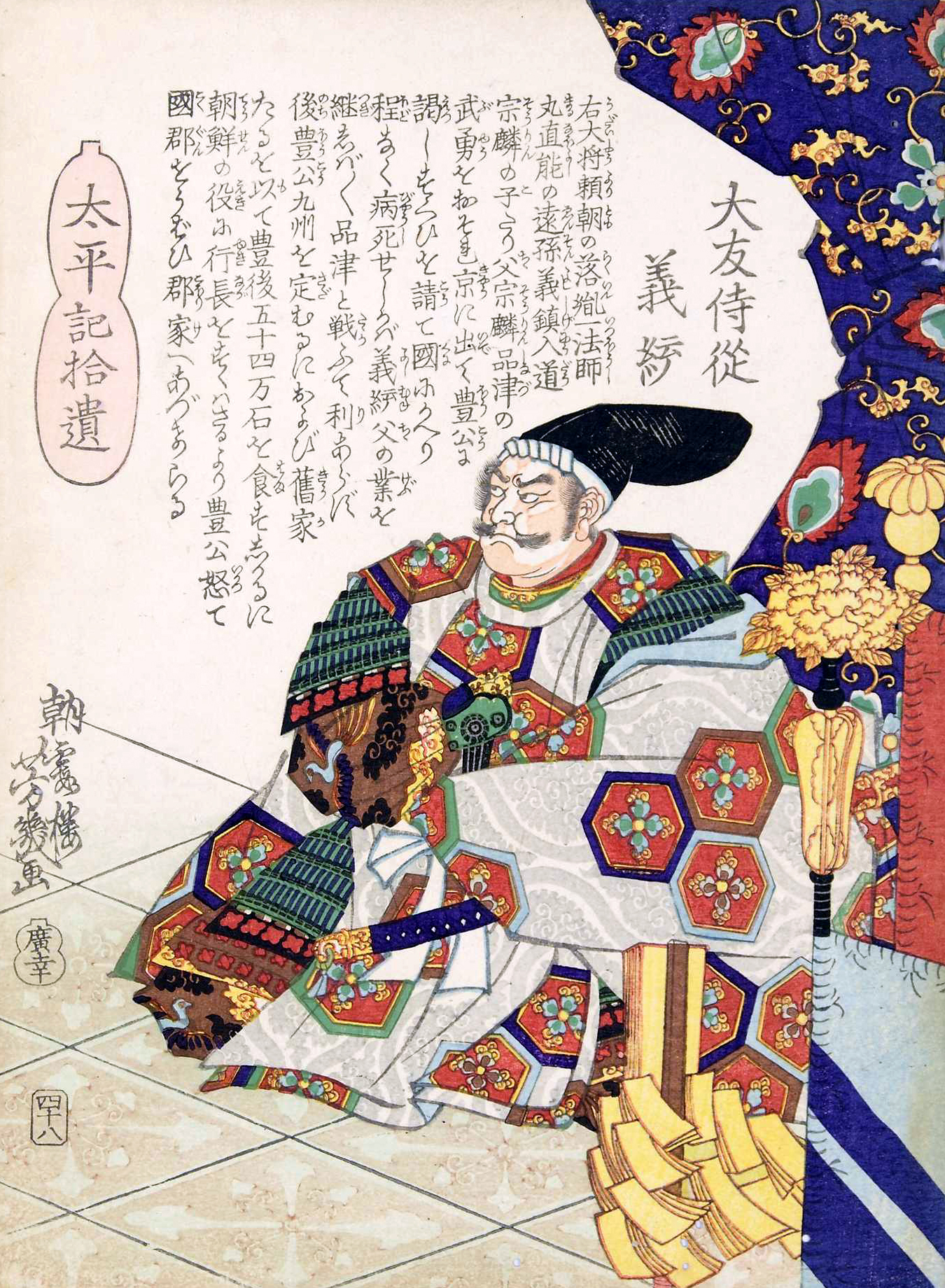 「太平記拾遺四十八：大友侍従義統」